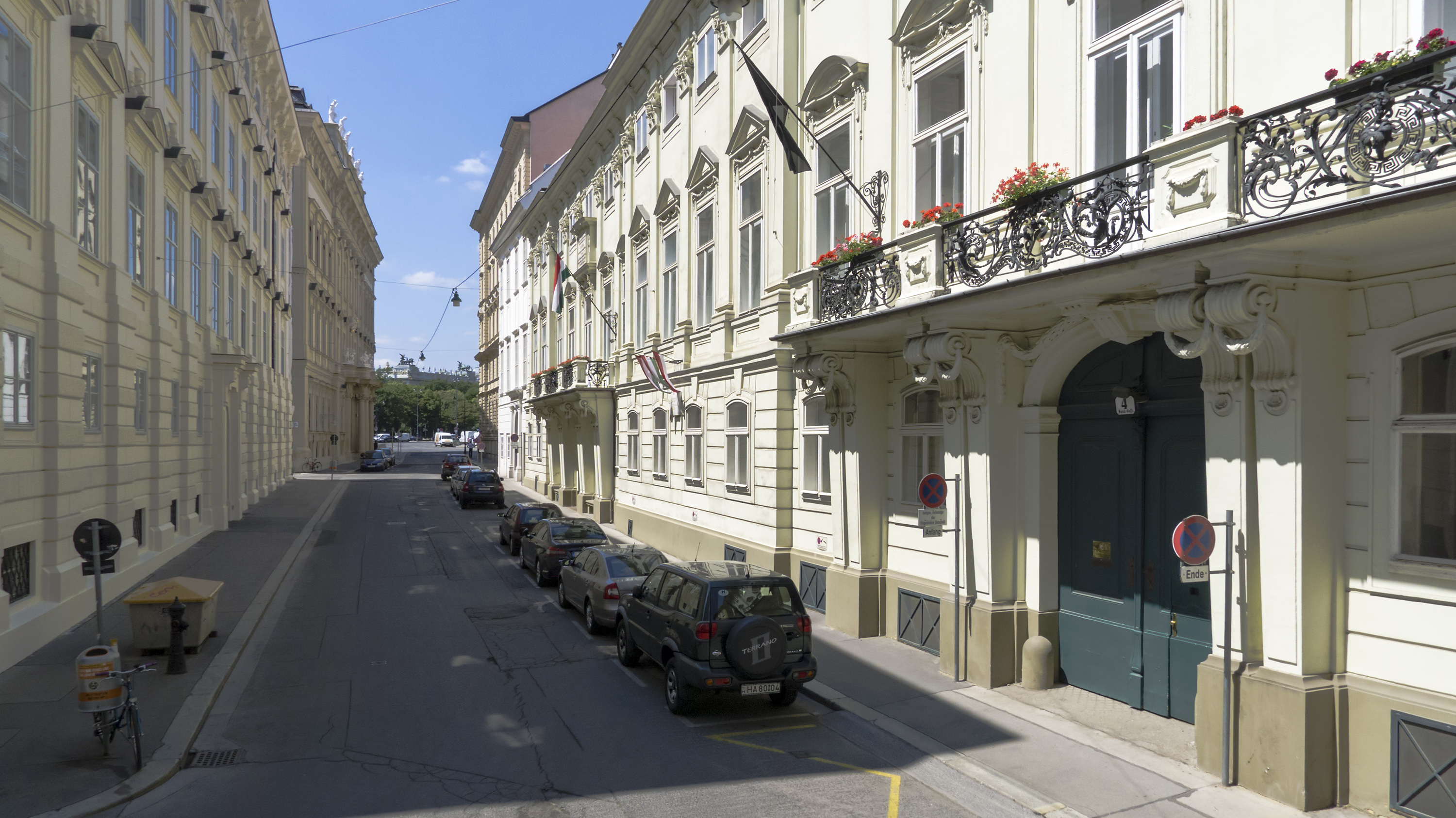 Bankgasse in Wien 1 bei der Petrarcagasse Richtung Westen